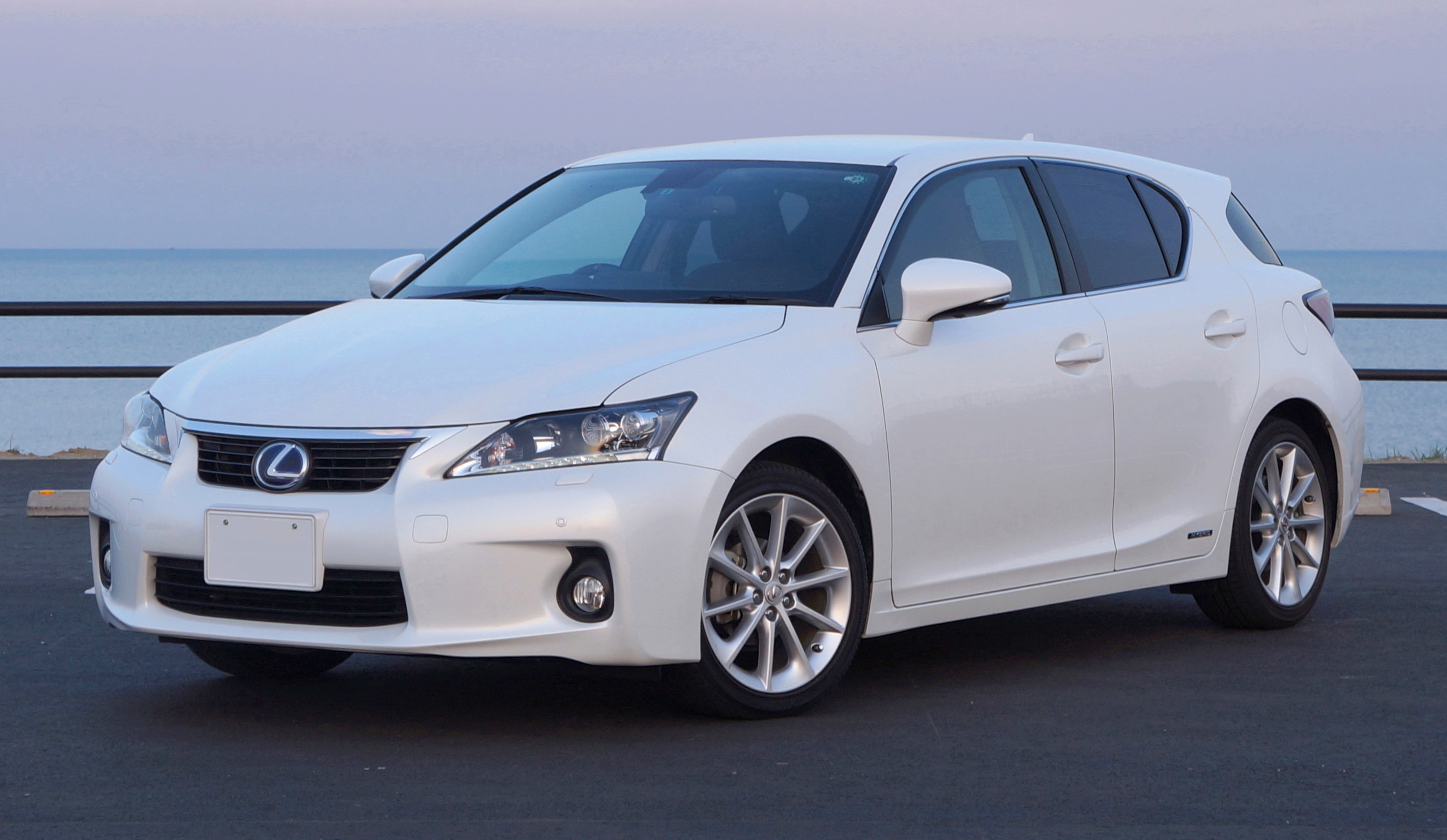 LEXUS CT200h 2011 front Japan